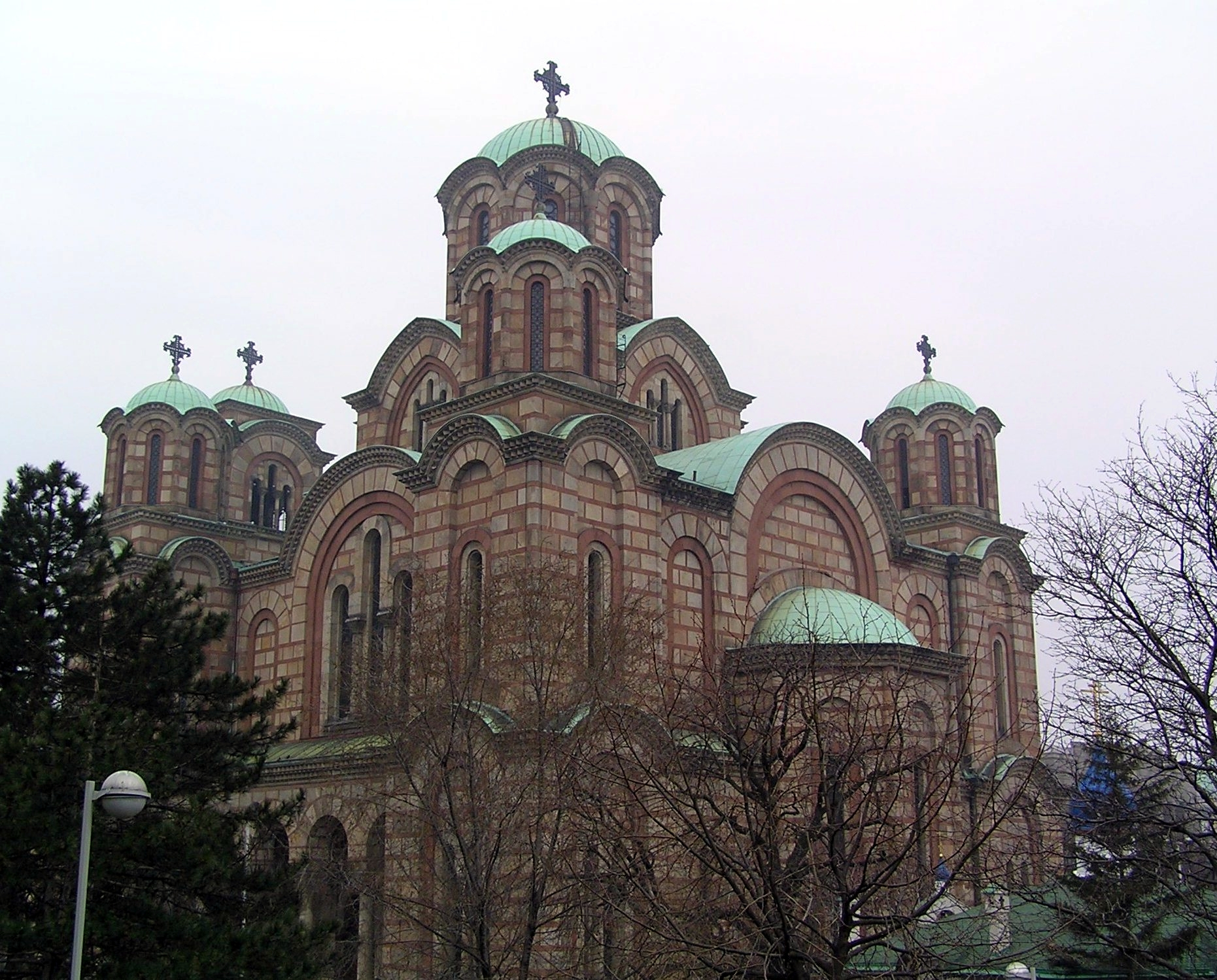 self-made